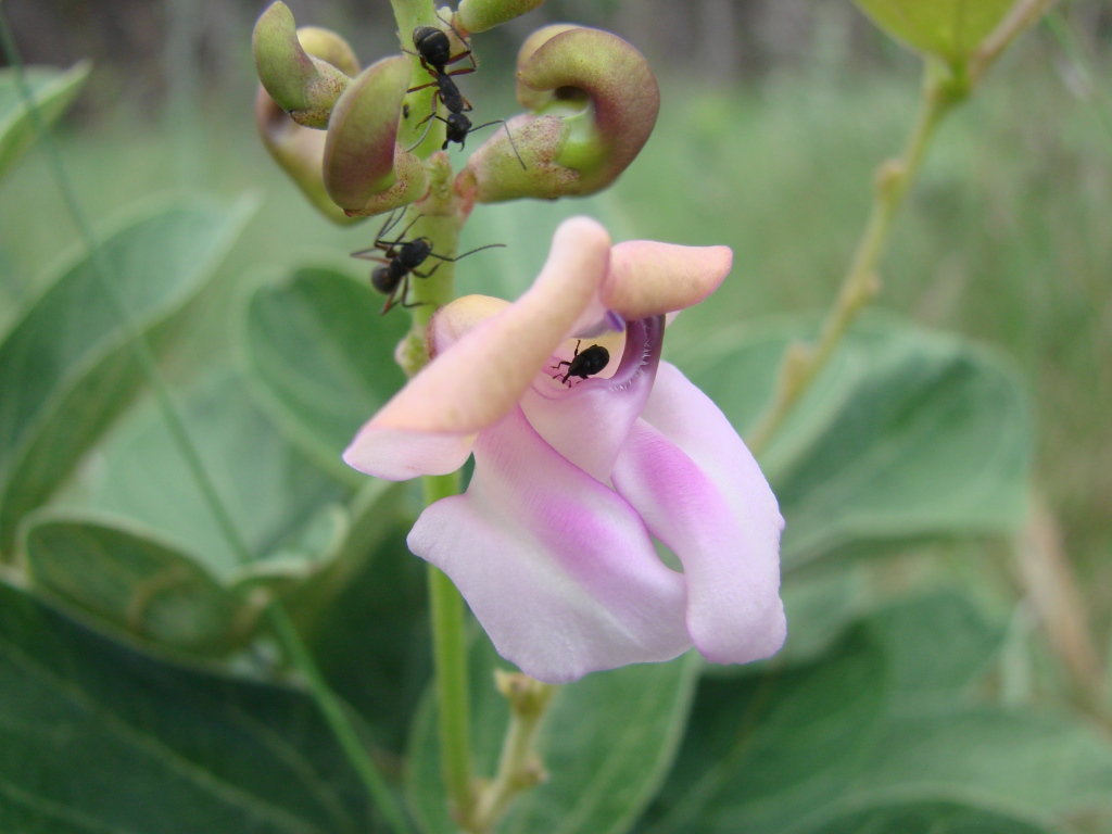 Vigna firmula (Mart. ex Benth.) Maréchal et al. (tem como bas. Phaseolus firmulus Mart. ex Benth. ) - FABACEAE - Parque Nacional da Chapada dos Veadeiros - Cavalcante - Goiás - Brasil.